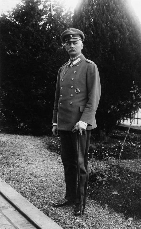 Erich von Falkenhayn General der Infanterie von Falkenhayn. 207-17 Abgebildete Personen: Falkenhayn, Erich von: General, kaiserliches Heer, Deutschland